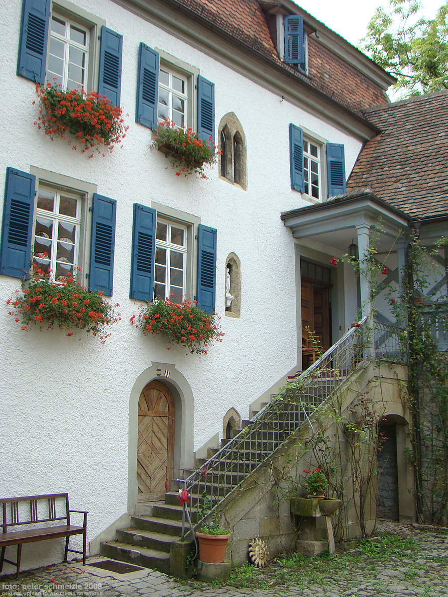 Schloss Oedheim, Hauptbau – am Tag des offenen Denkmals 2008